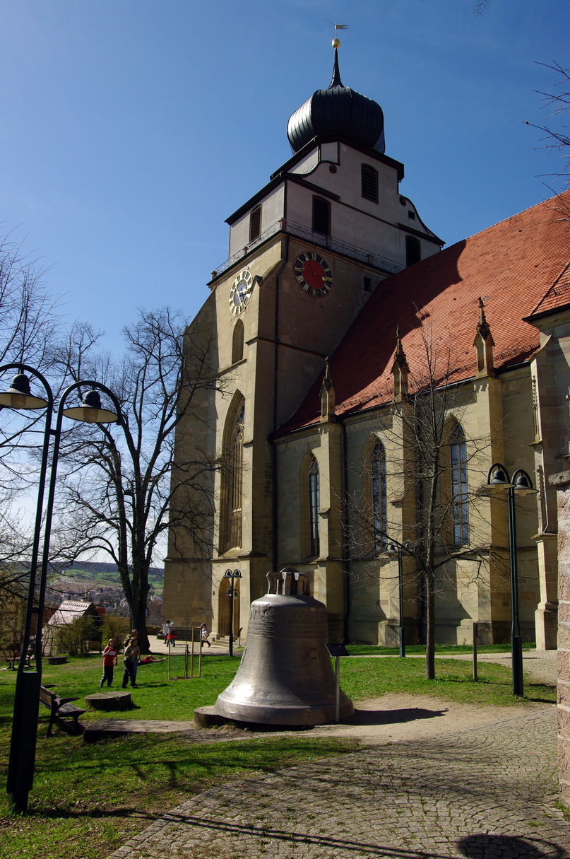 Stiftskirche Herrenberg